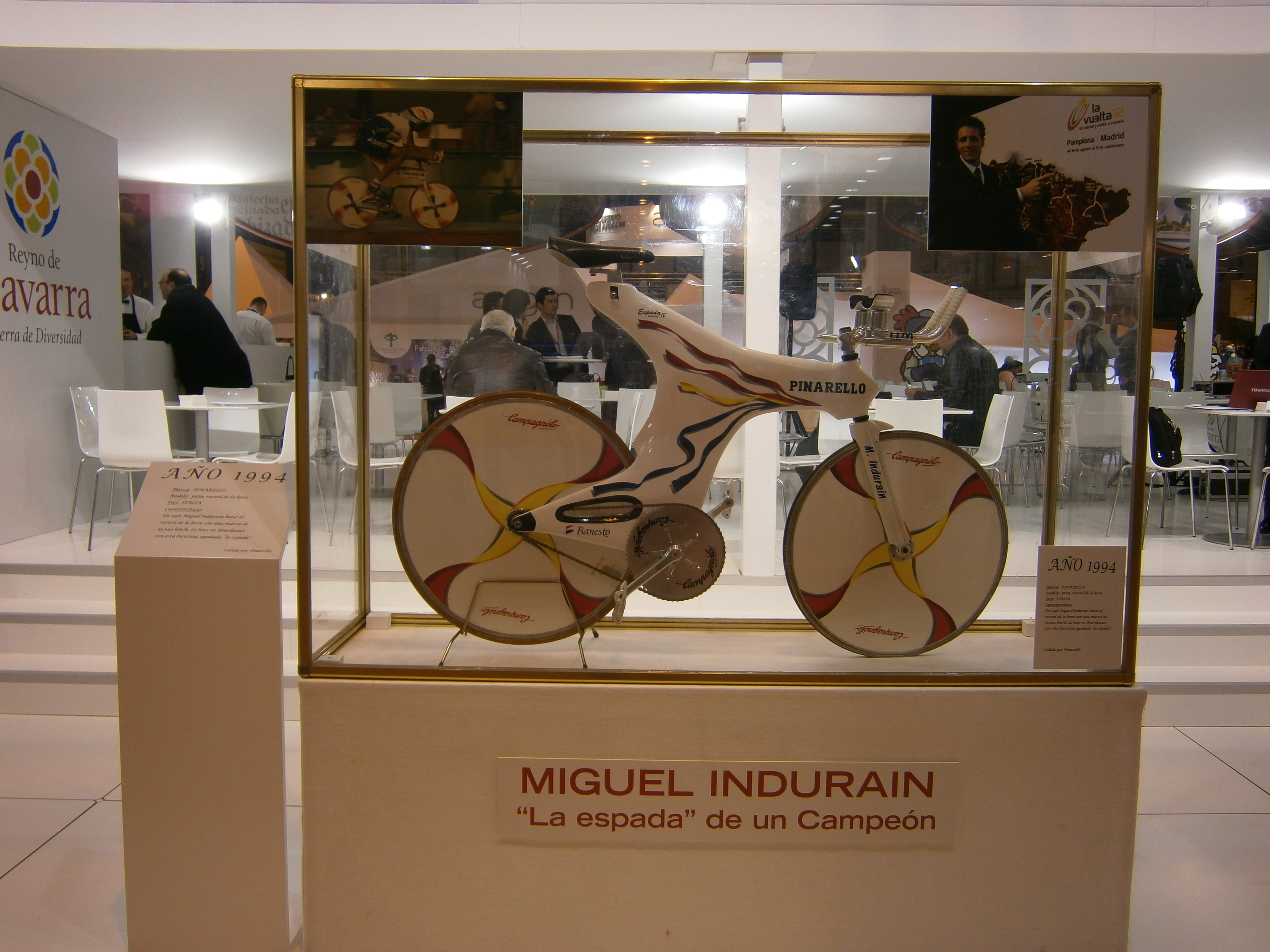 Bicicleta de Miguel Indurain en Fitur 2012